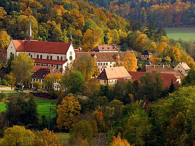 Blick auf Kloster Bronnbach in Baden-Württemberg, Deutschland